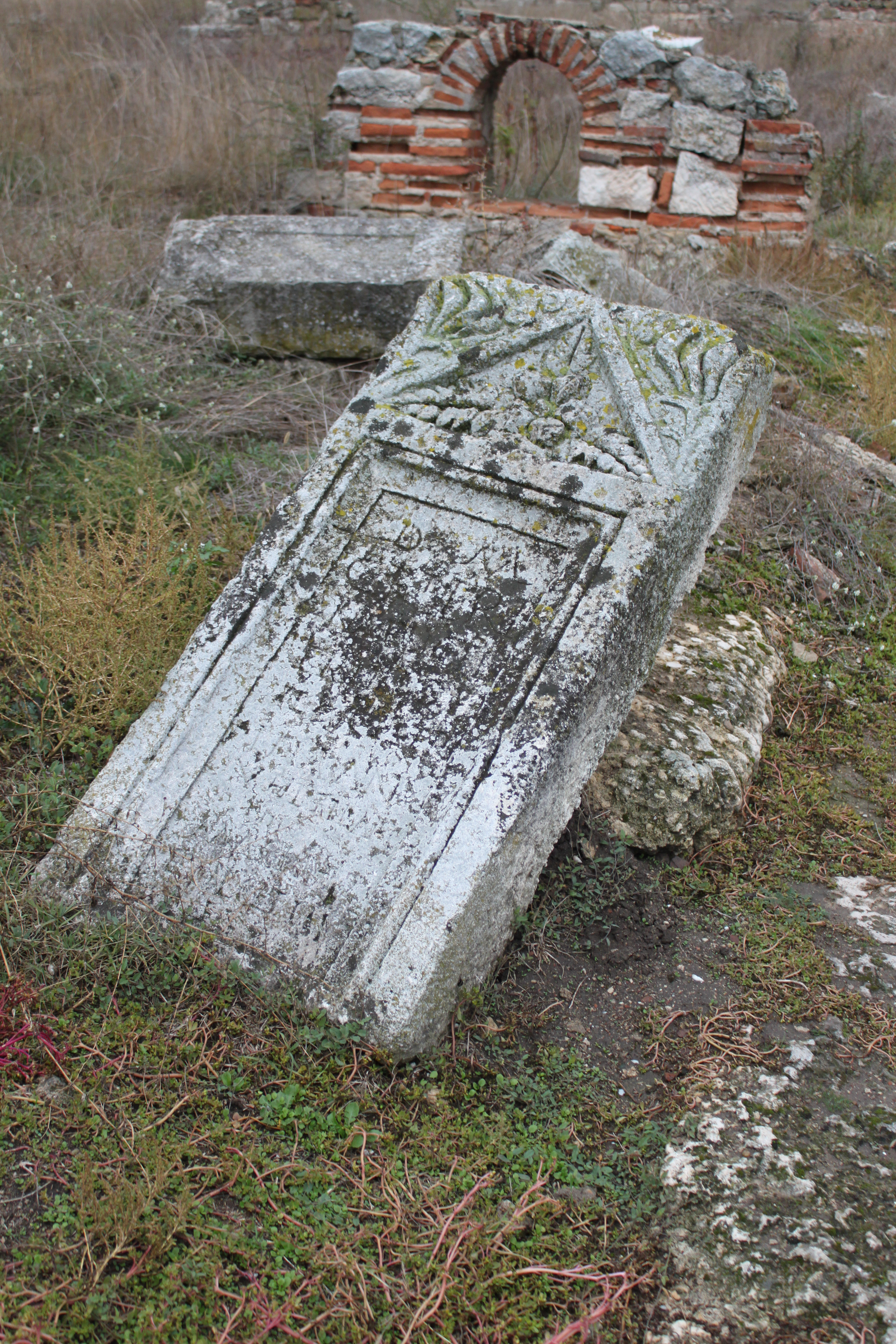 Colonia Ulpia Oescus: lateinisch Ulpia Escus; Nordbulgarien; an der Donau; beim Dorf Gigen; menschenleer; eingezäunt; gepflegte Anlage